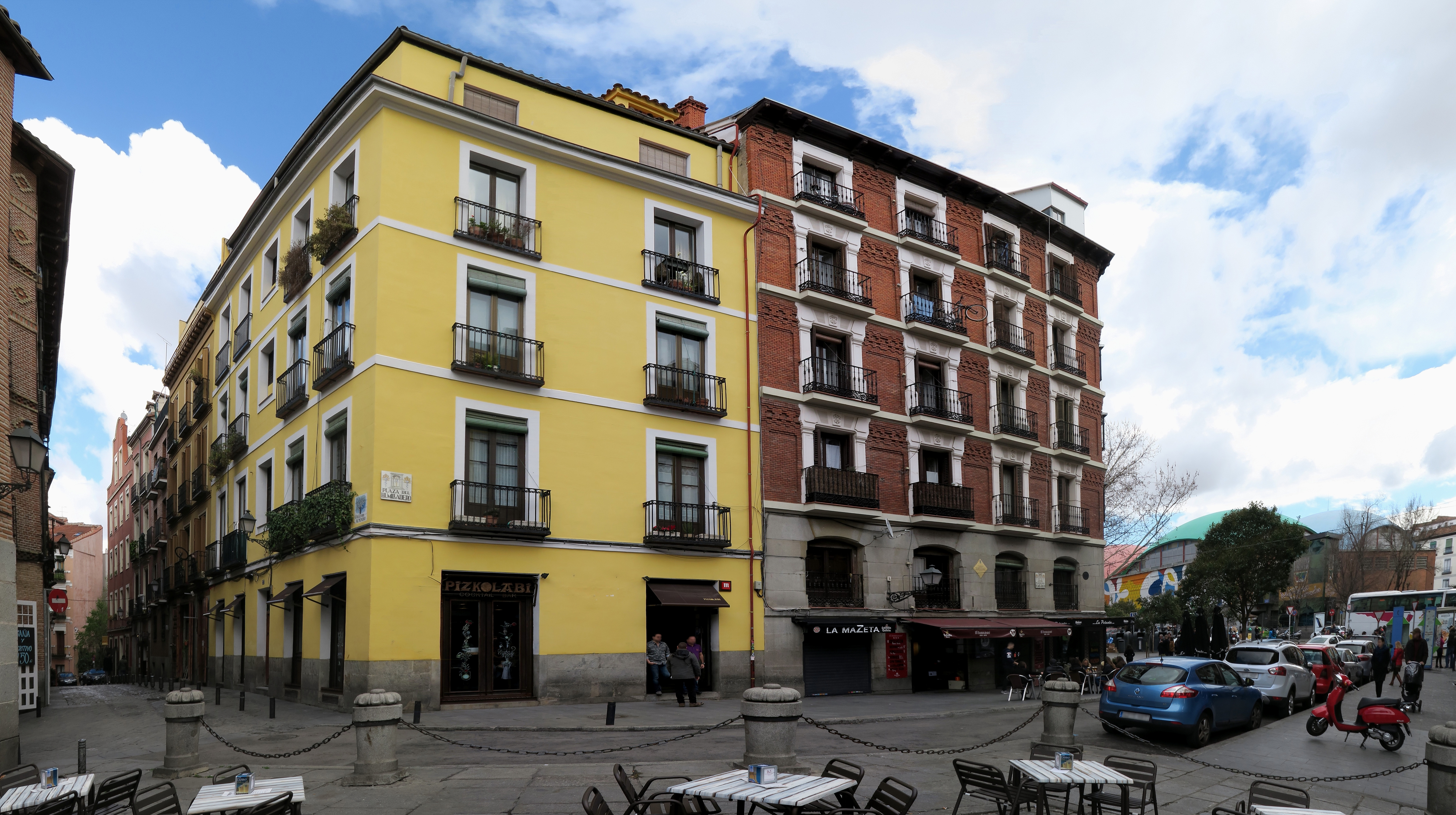 Plaza del Humilladero